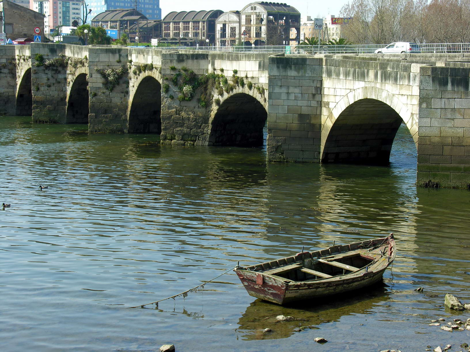 Cambre, Galiza, Spain.